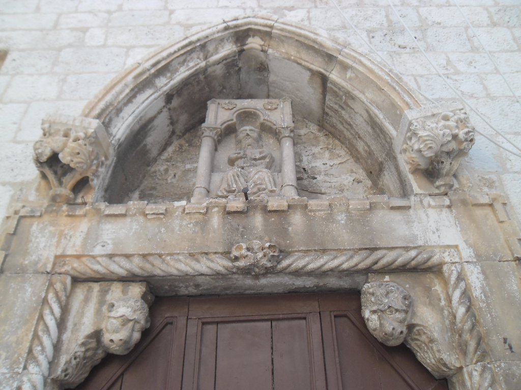 grad Hvar